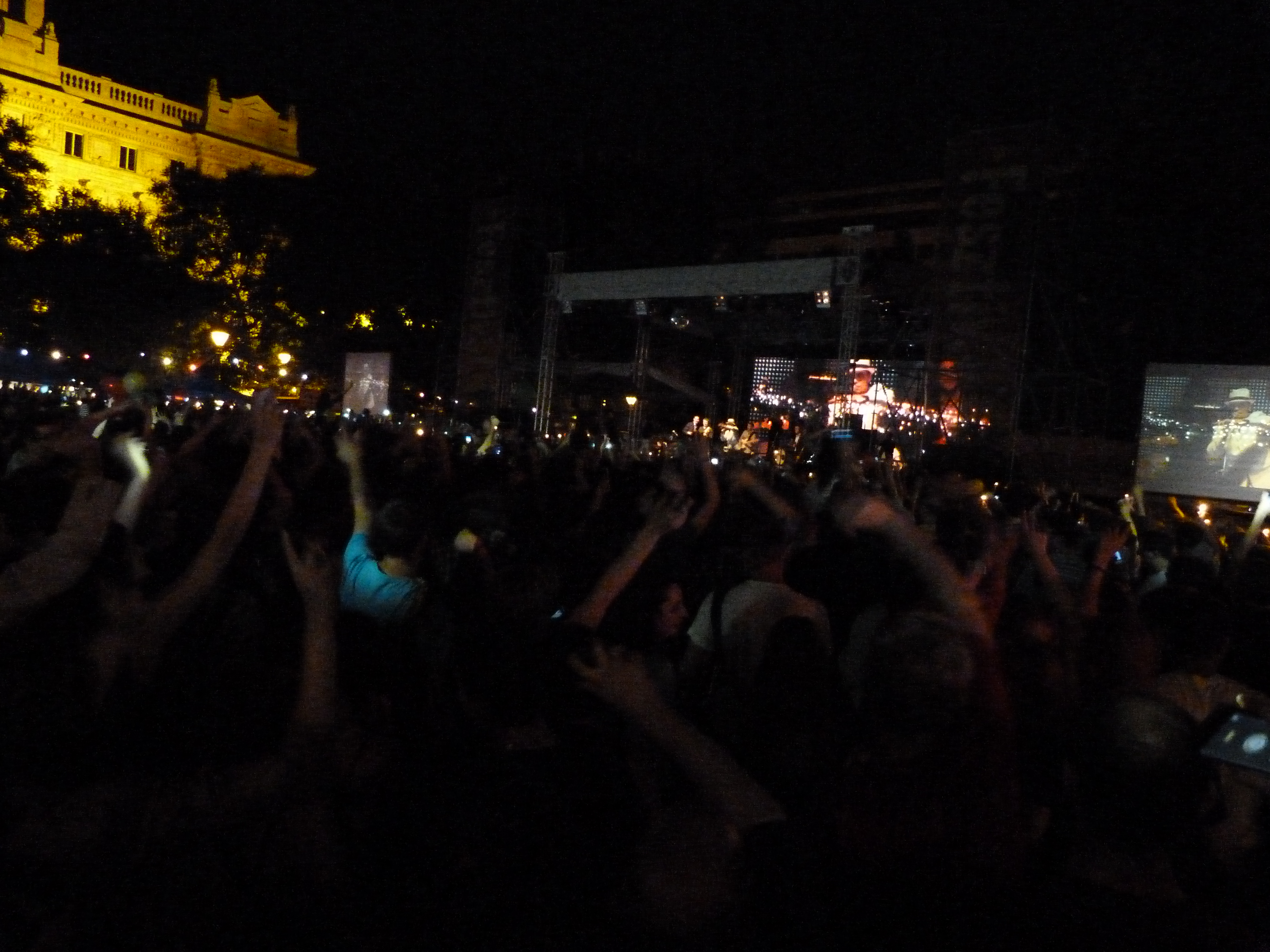 A felvétel 2013. június 8 –án, szombaton készült Budapesten, a Szabadság téren. PASO együttes. Belváros Lipótváros Önkormányzata 2013. Június 7-9 között, három napos Belvárosi Fesztivált rendezett három helyszínen: a Szabadság téren, az Erzsébet téren és a Zrinyi utcában. Az idén hetedik alkalommal megrendezésre került Belvárosi Fesztivált Magyarország legnagyobb ingyenes fesztiváljaként tartják számon. Rogán Antal, Belváros Lipótváros polgármestere hangsúlyozta, hogy a szürke hétköznapok rutinja mellett a kikapcsolódásra, szórakozásra is szakítsunk időt. ©© Published under Creative Commons in the Metapolisz DVD line. All of the photos and vids in the Metapolisz DVD line are under Creative Commons and can be used even for commercial – for profit – purposes. Recommended Citation Derzsi Elekes Andor: Metapolisz DVD line